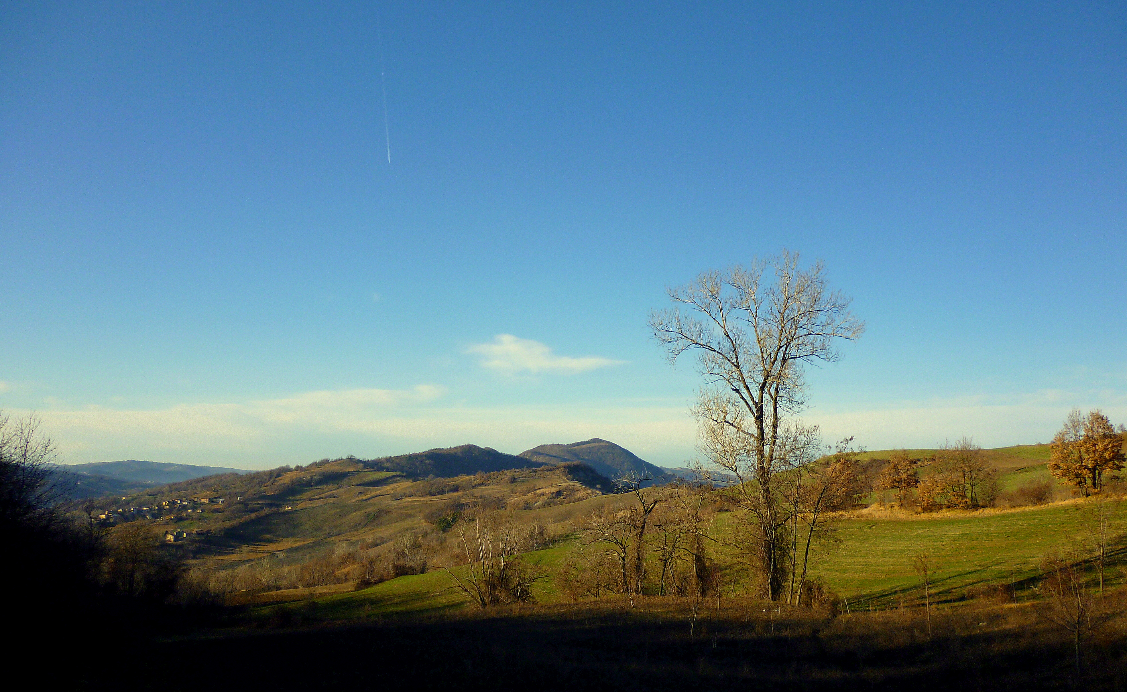 Marzonago e Monte Aldone